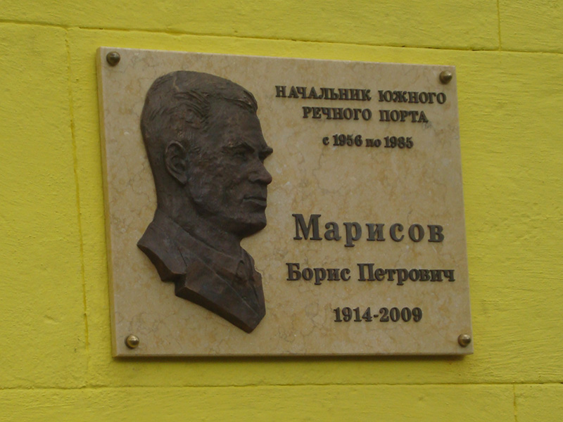 Фотография сделана в день открытия мемориальной доски.